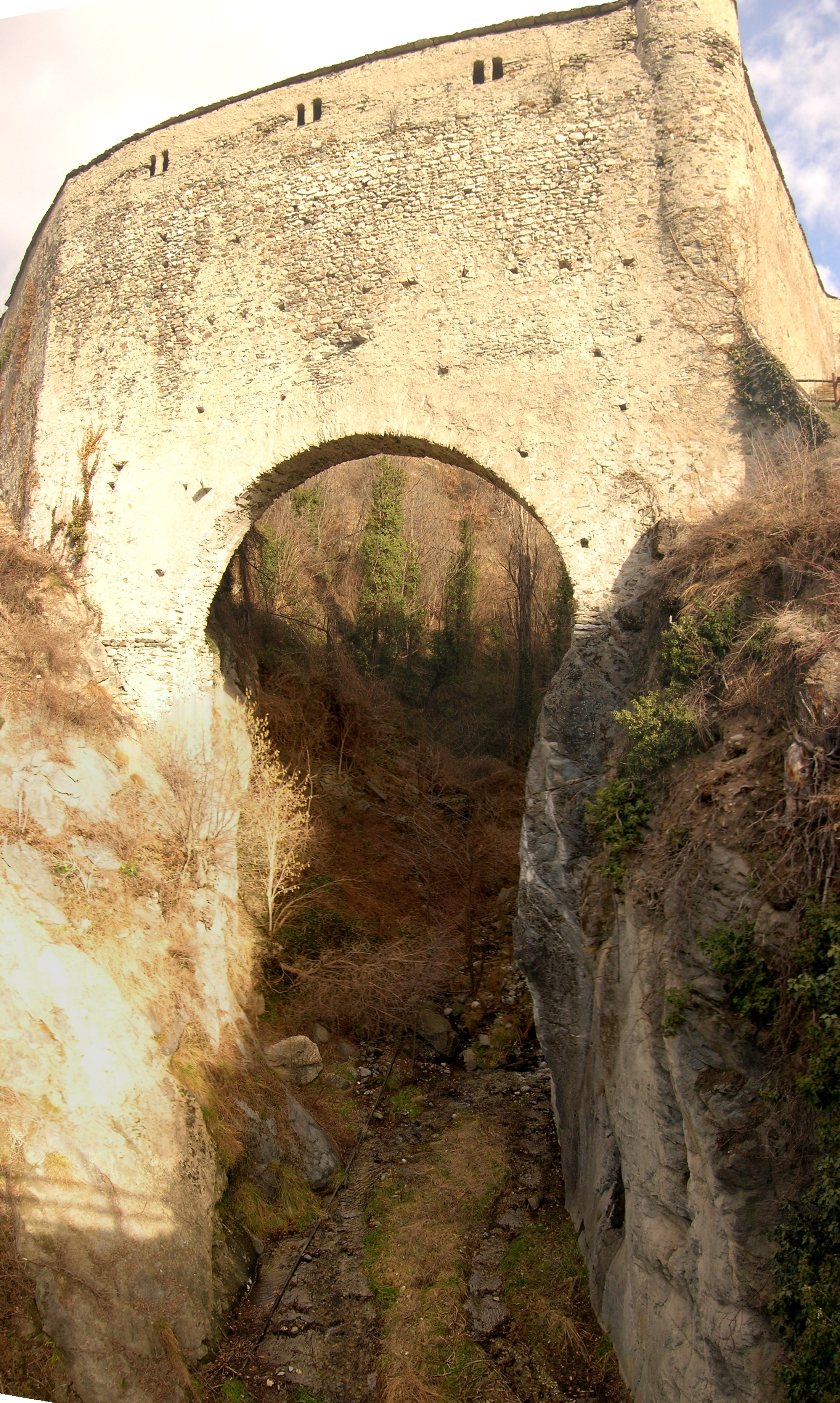 Ponte acquedotto di Grand Arvou, in località Porossan, Aosta, Valle d'Aosta, Italia.